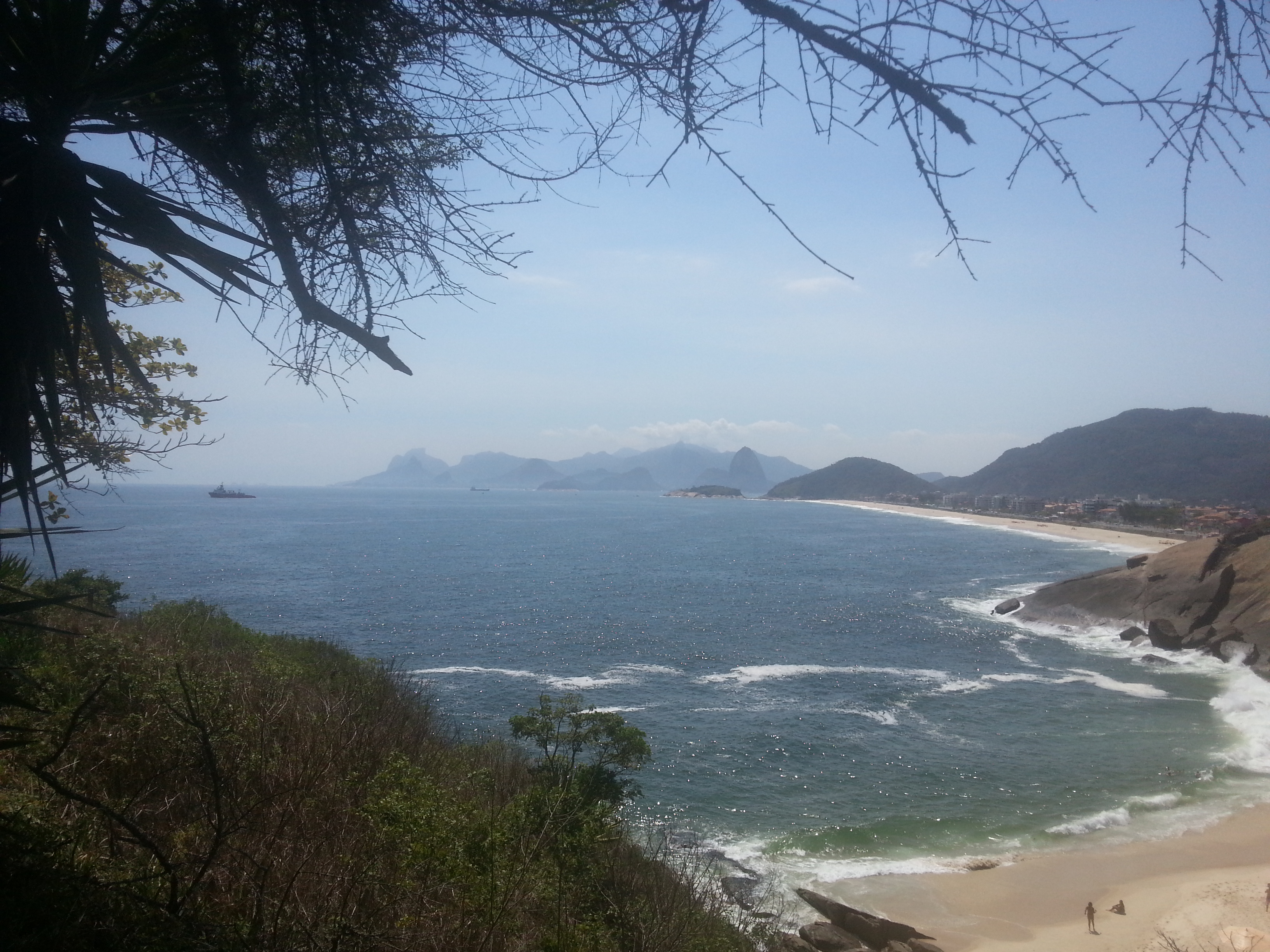 Praia do Sossego, localizada na Região Oceânica de Niterói